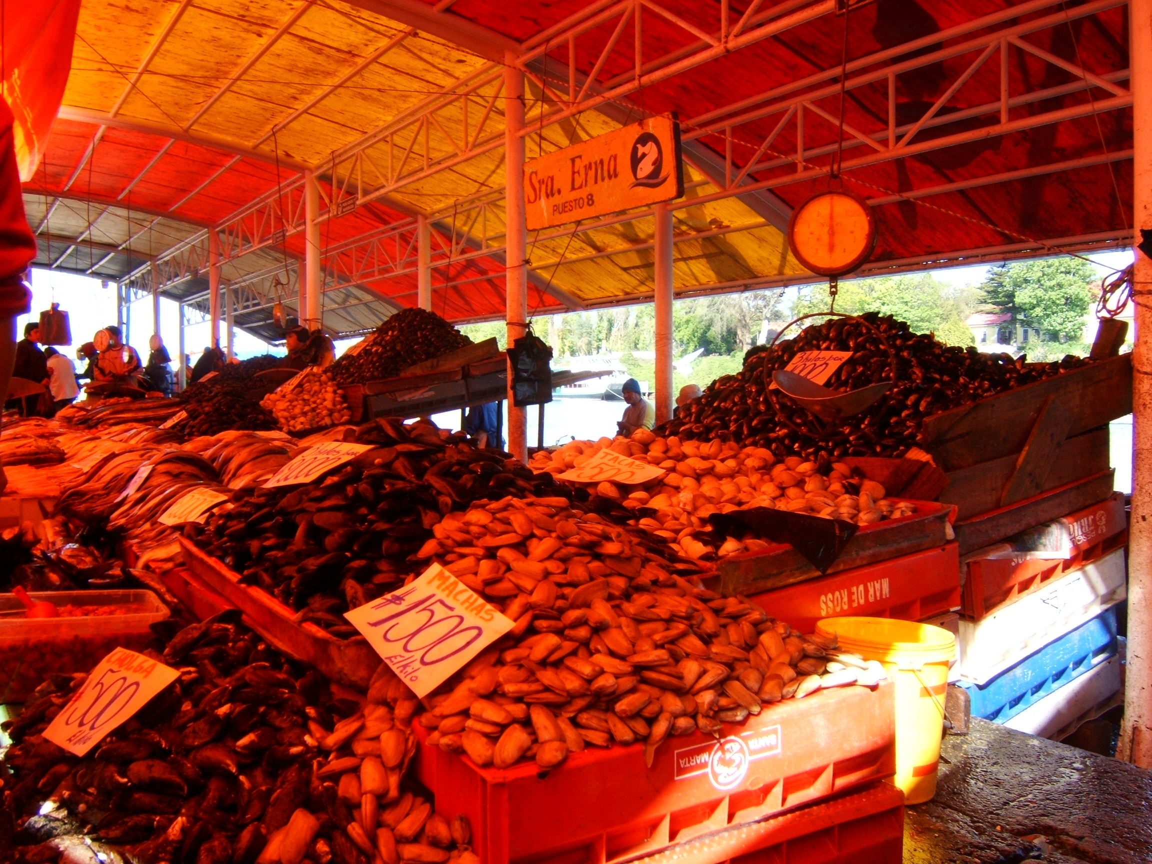 Catedral de San Marcos This is a photo of a national monument in Chile: 2132